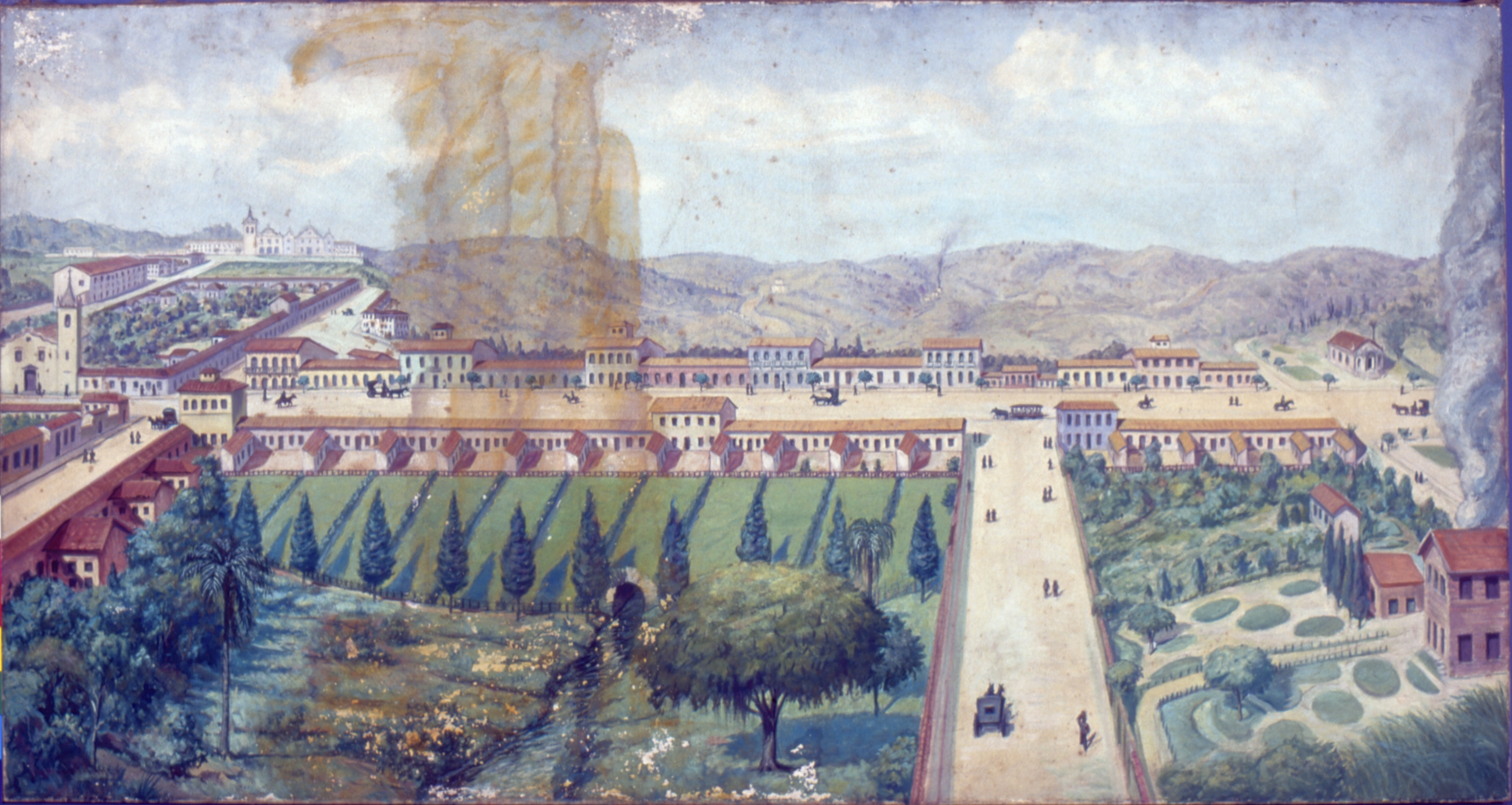 Obra que integra o acervo do Museu Paulista da USP. Coleção Fundo Museu Paulista - FMP